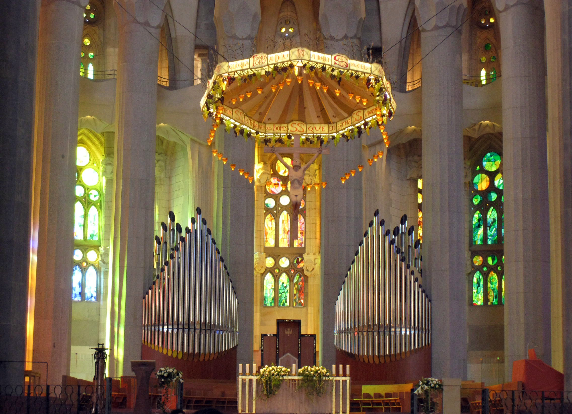 Temple Expiatori de la Sagrada Família (Barcelona)